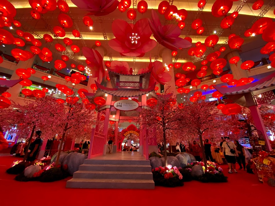 吉隆坡時代廣場2020年新春裝飾